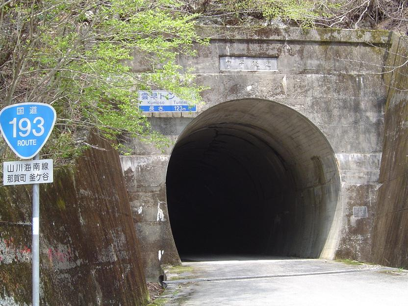 国道193号雲早トンネル徳島県那賀郡那賀町側。（本当は国道未指定区間）